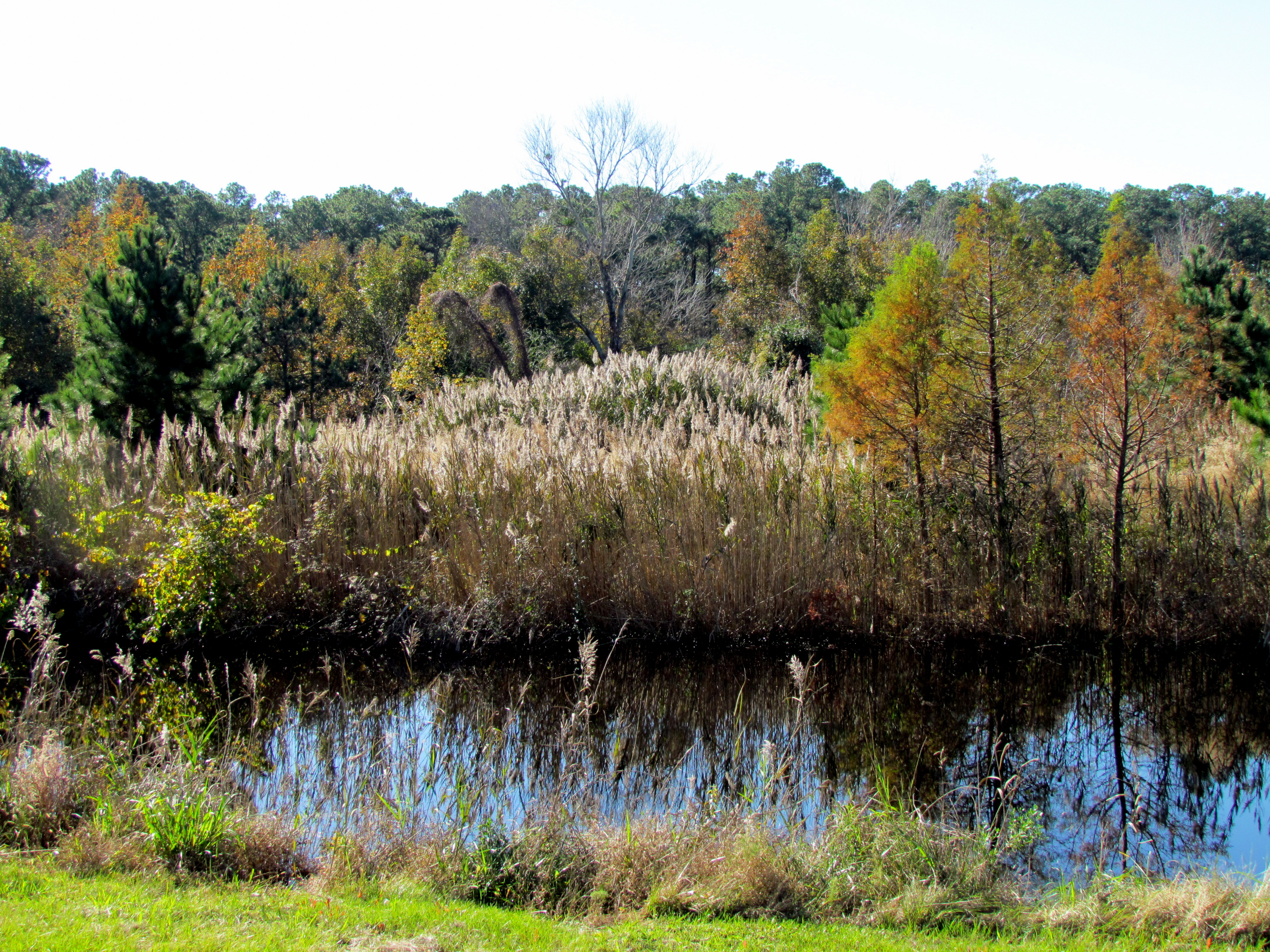 Mattamuskeet NWR Fairfield NC 8896